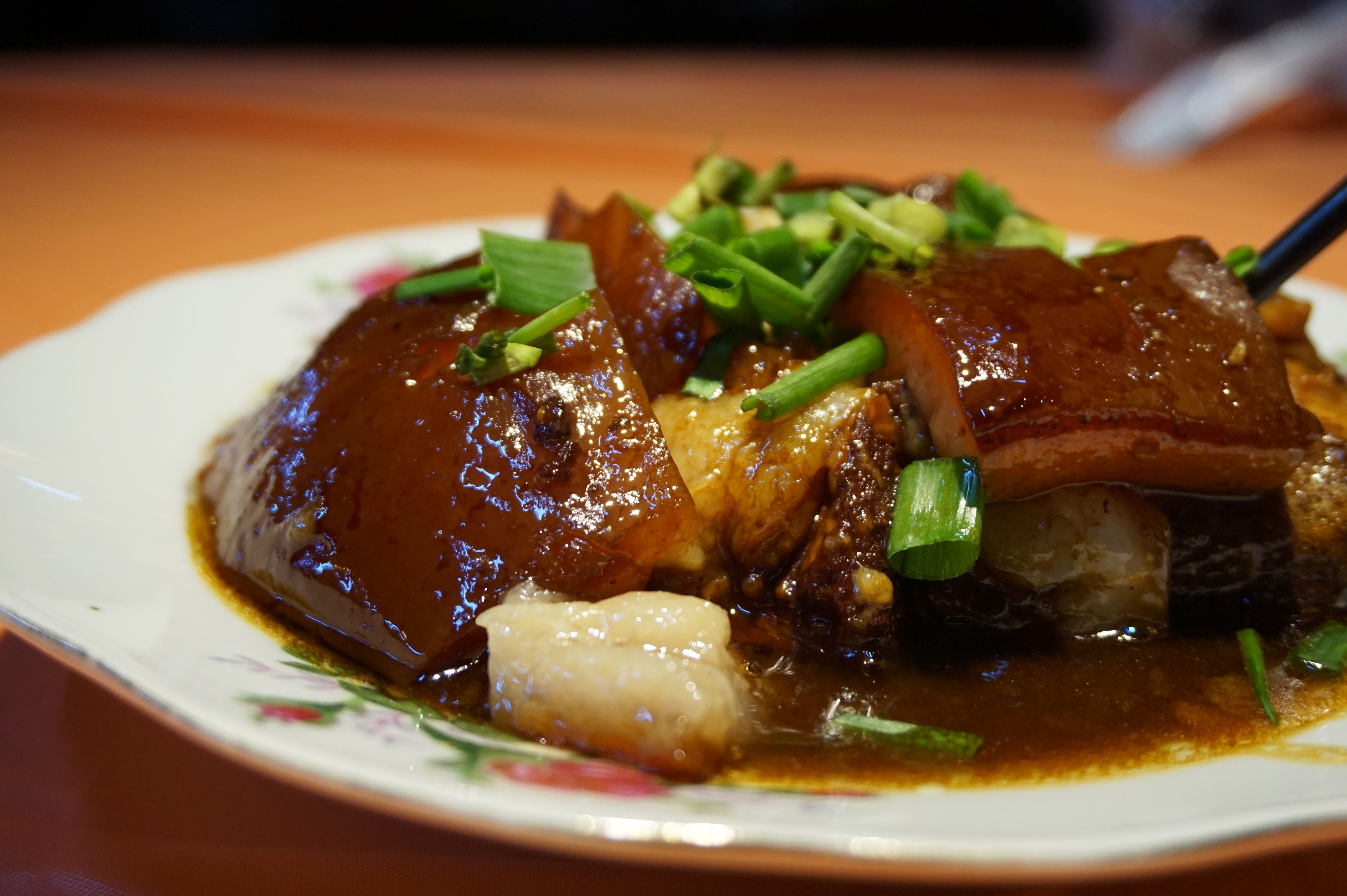 盐官缸肉。与东坡肉类似。